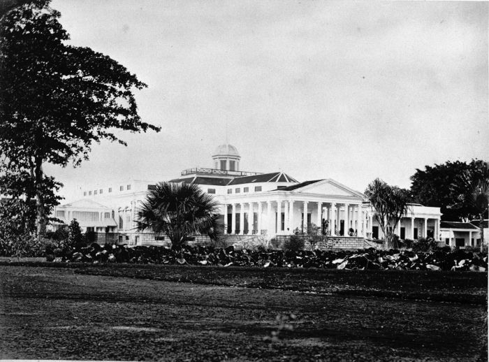 Foto. Het paleis van de Gouverneur-Generaal.